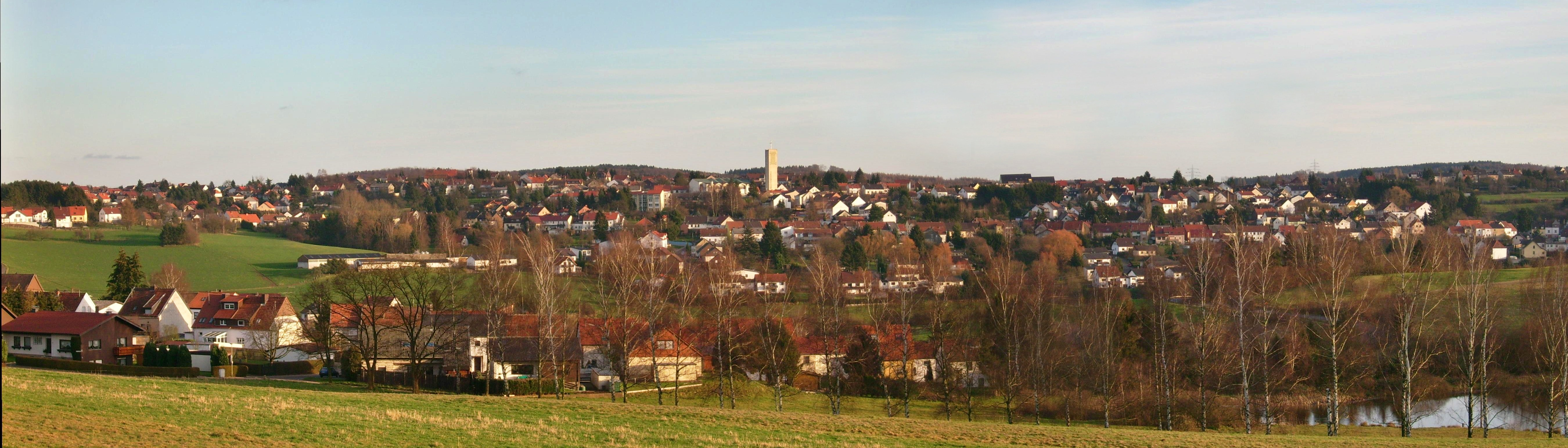 Merchweiler Panorama von der Bergkapelle